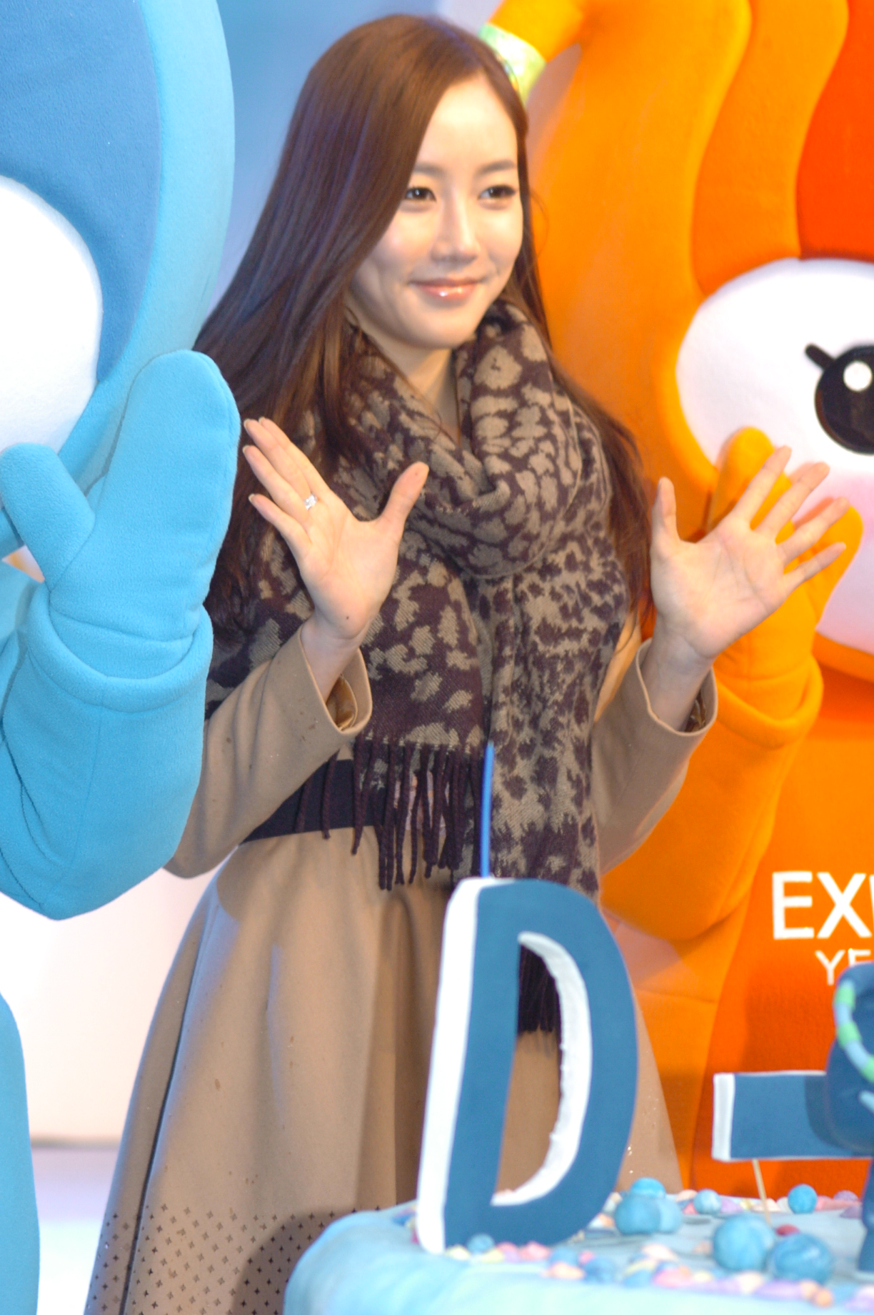 2012여수세계박람회성공기원컷팅식